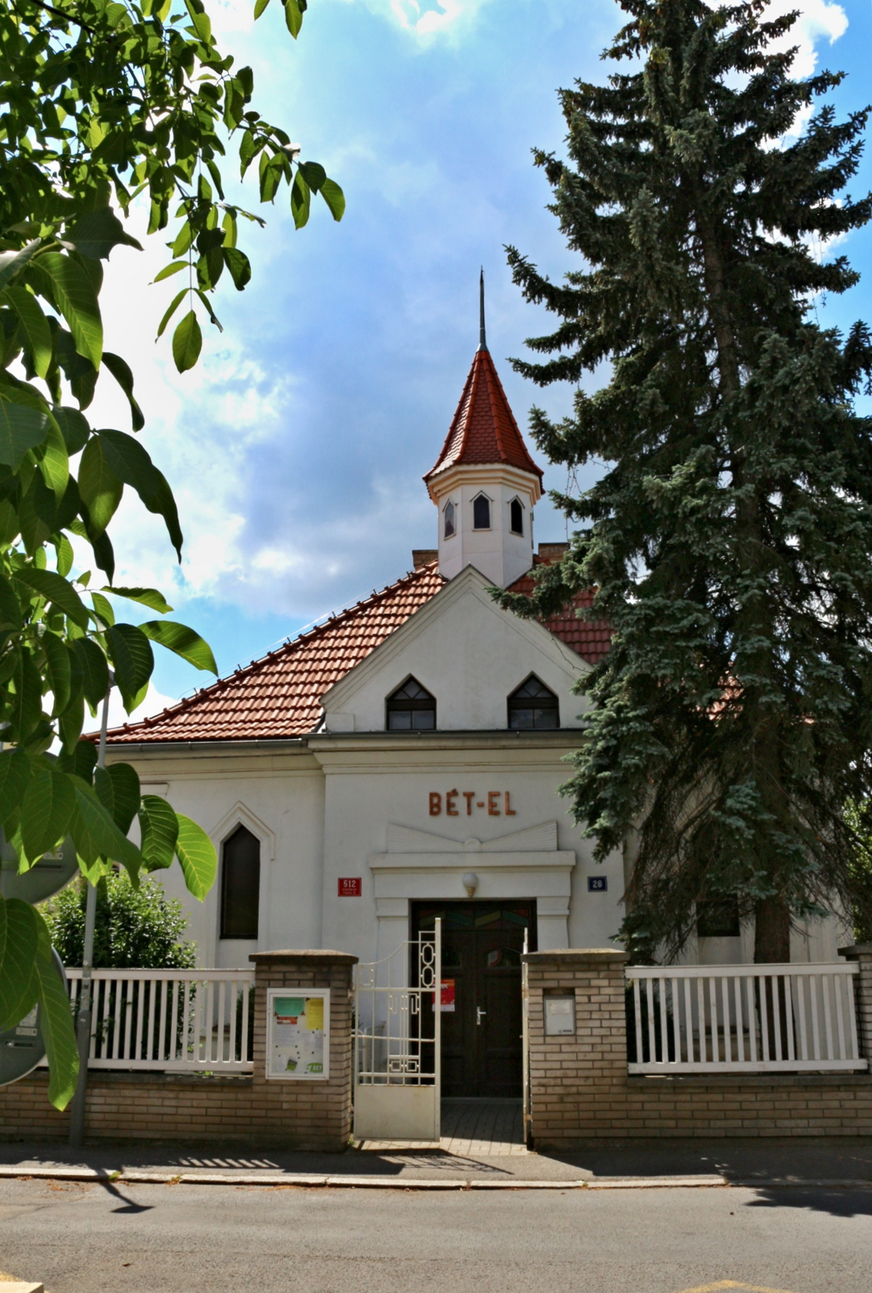 Strašnický Bét El